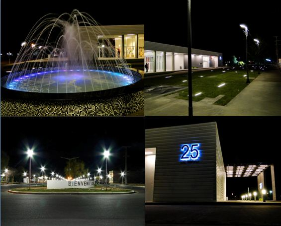 Fuente - Terminal de Omnibus (arriba-izquierda)Terminal de Omnibus (Derecha - Arriba y Abajo) Acceso a Ciudad de 25 de Mayo (Izquierda-Abajo)